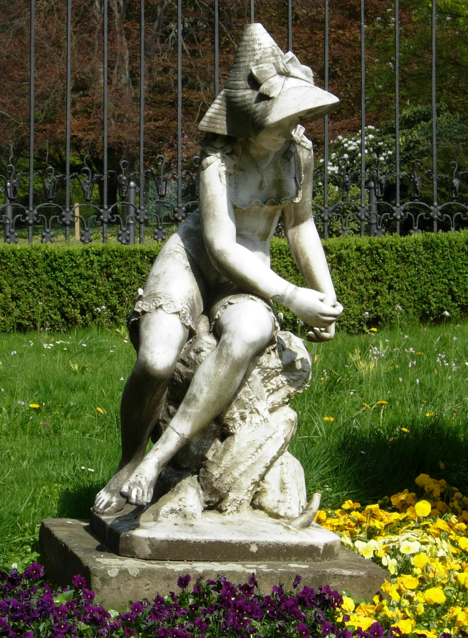 Cipriani: Marmorskulptur Anglerin (19. Jahrhundert) vor der Redoute in Bad Godesberg, ein Geschenk der Fabrikantenfamilie Ringsdorff an Godesberg; die Haltung der Hände und der Fisch, der rechts (vom Beschauer) aus der Plinthe herausragt, deuten auf eine Anglerin; es gibt ca. 15 bildende Künstler mit Nachnamen Cipriani, deren Werke in Auktionshäusern angeboten werden; der Schöpfer dieser Skulptur ist vielleicht Cipriano oder Giuseppe Cipriani; Quelle: Godesberger Heimatblätter, Heft 27, 1989